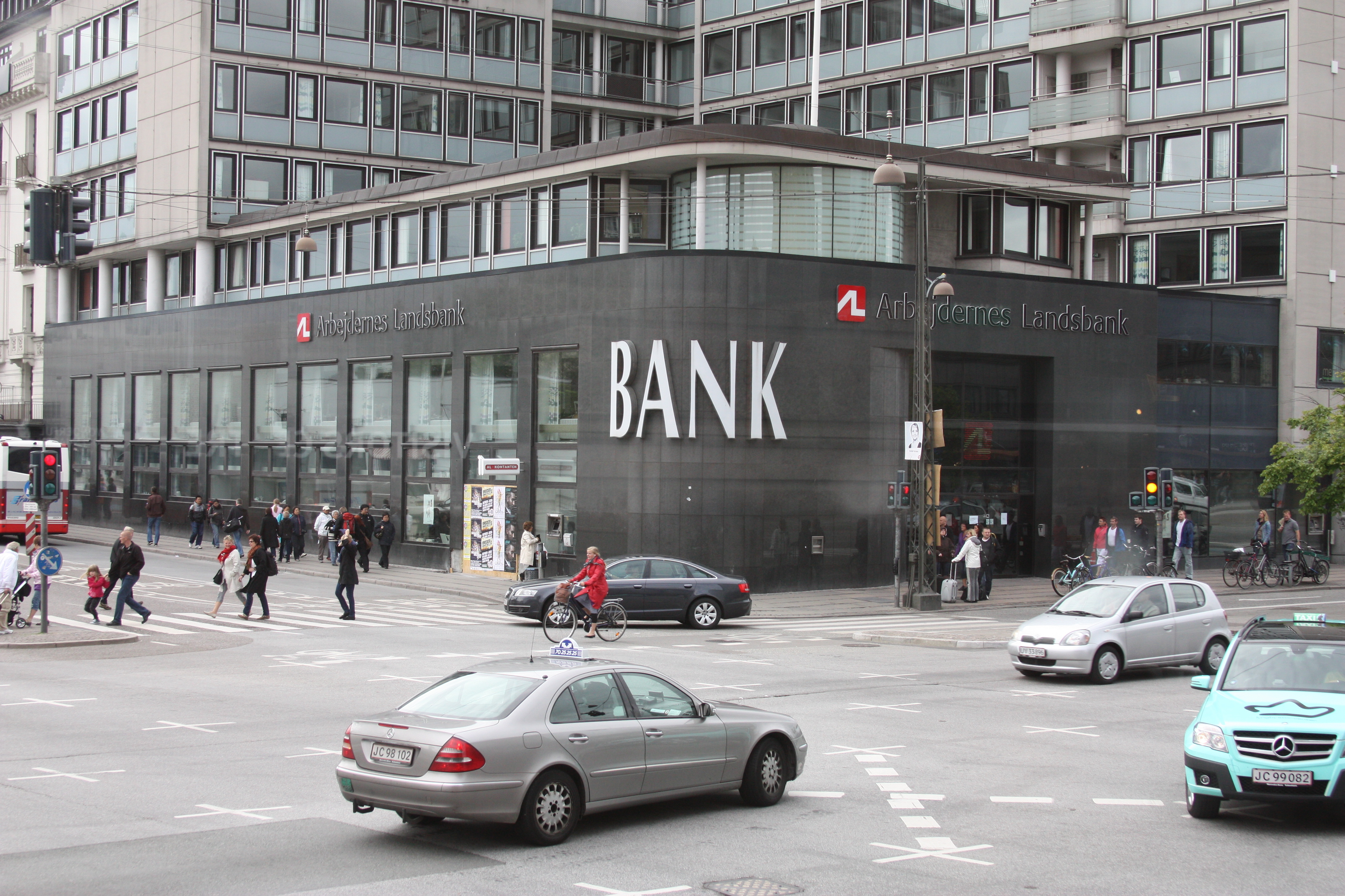 Kopenhagen 2009